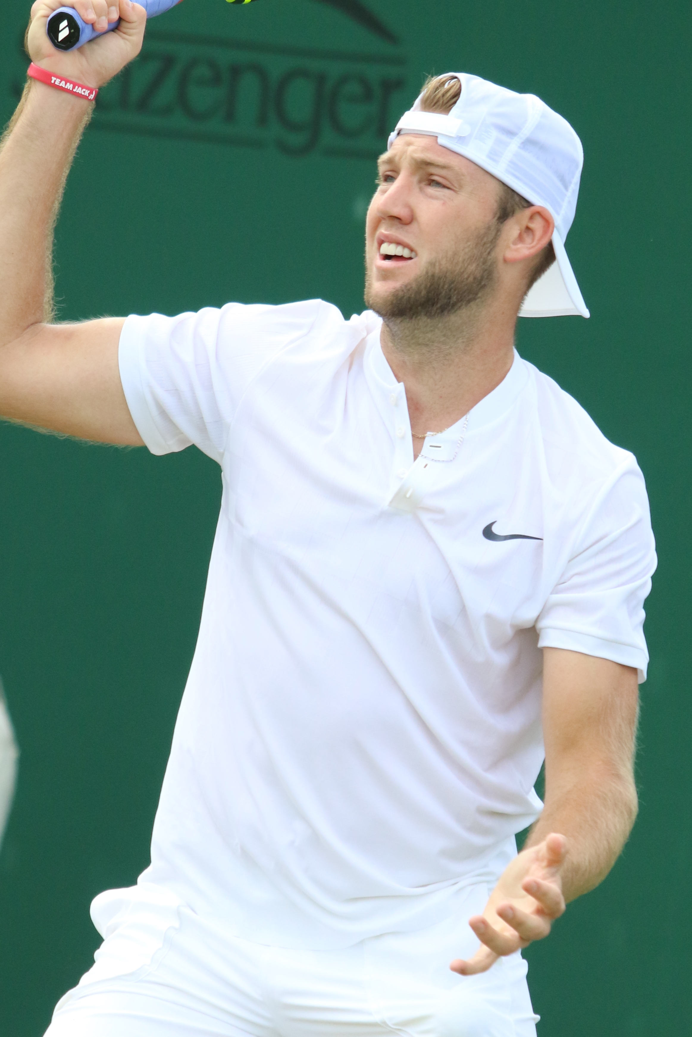 Sock WM17 (9)